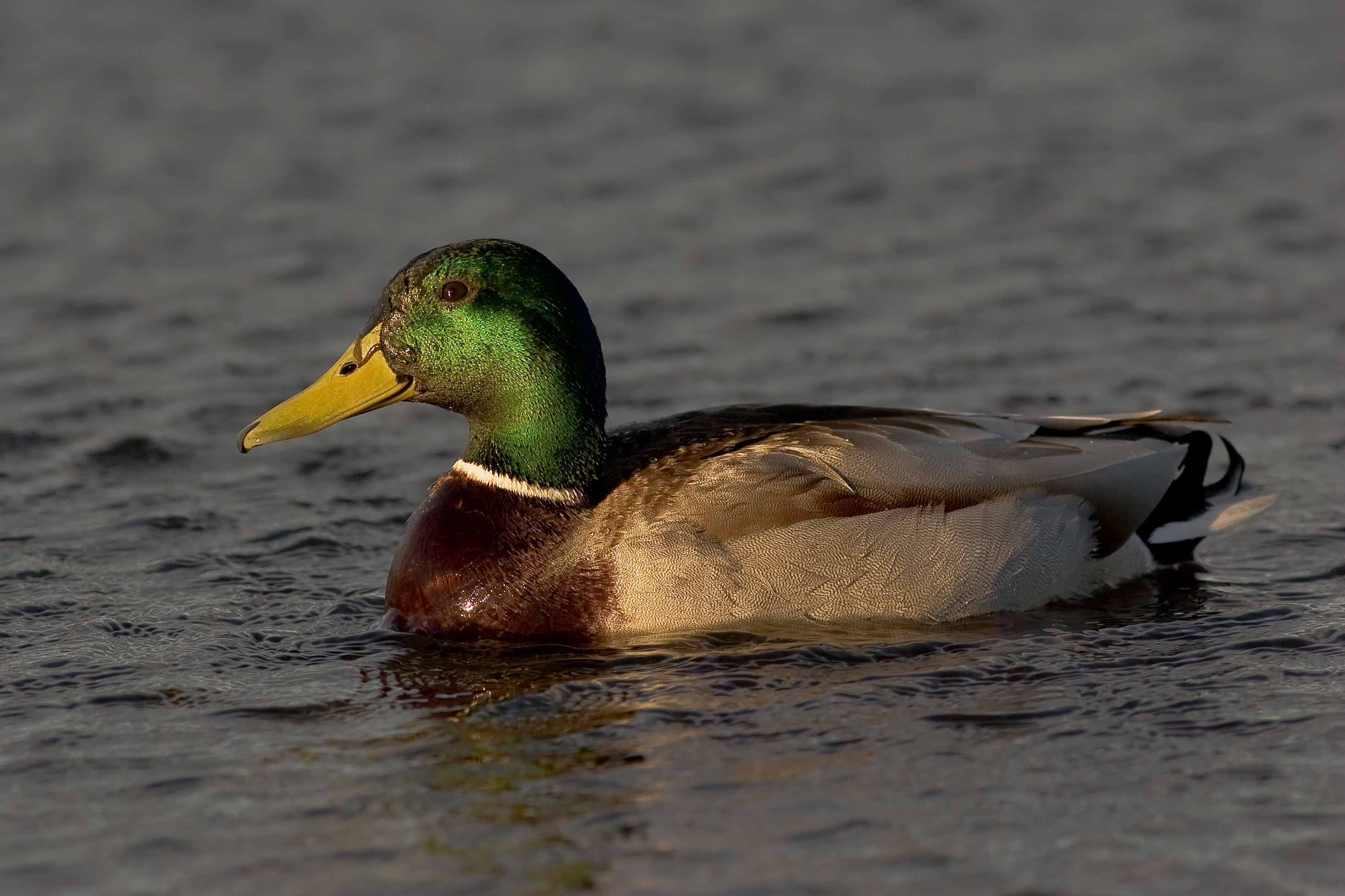 Male Mallard